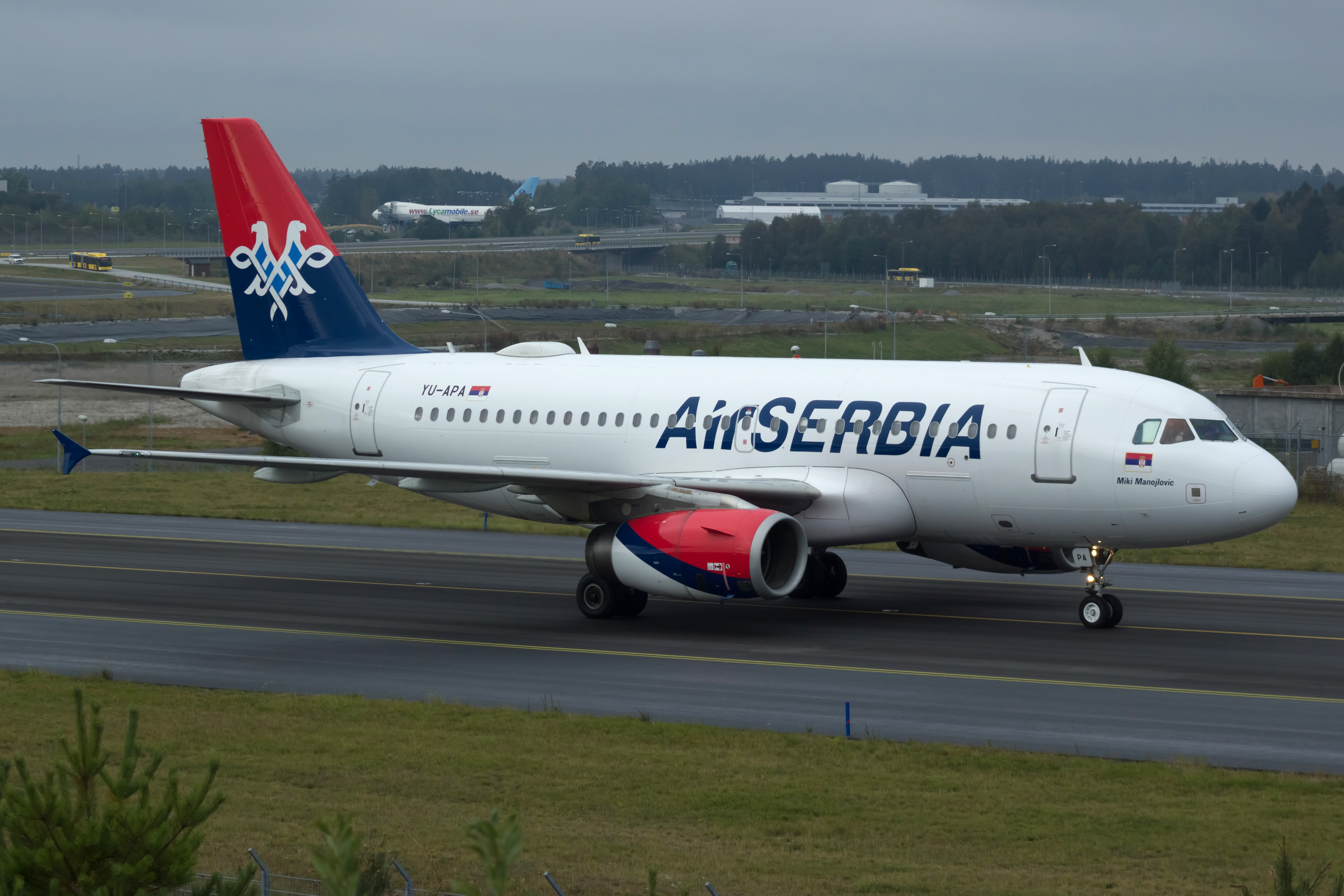 Airbus A319 de Air Serbia no aeroporto de Estocolmo-Arlanda.